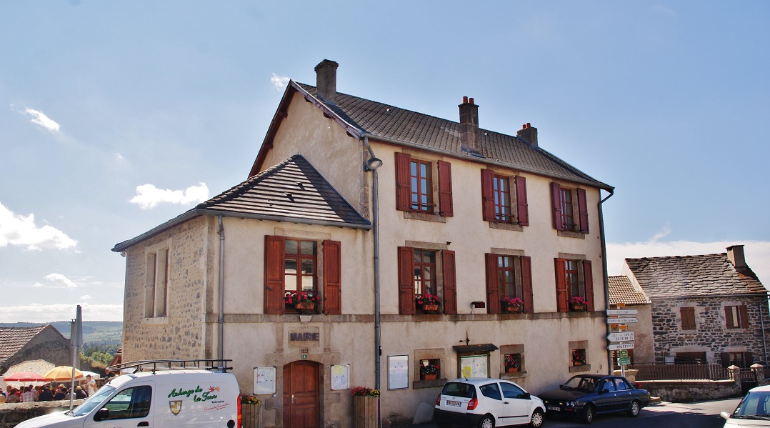 La Mairie